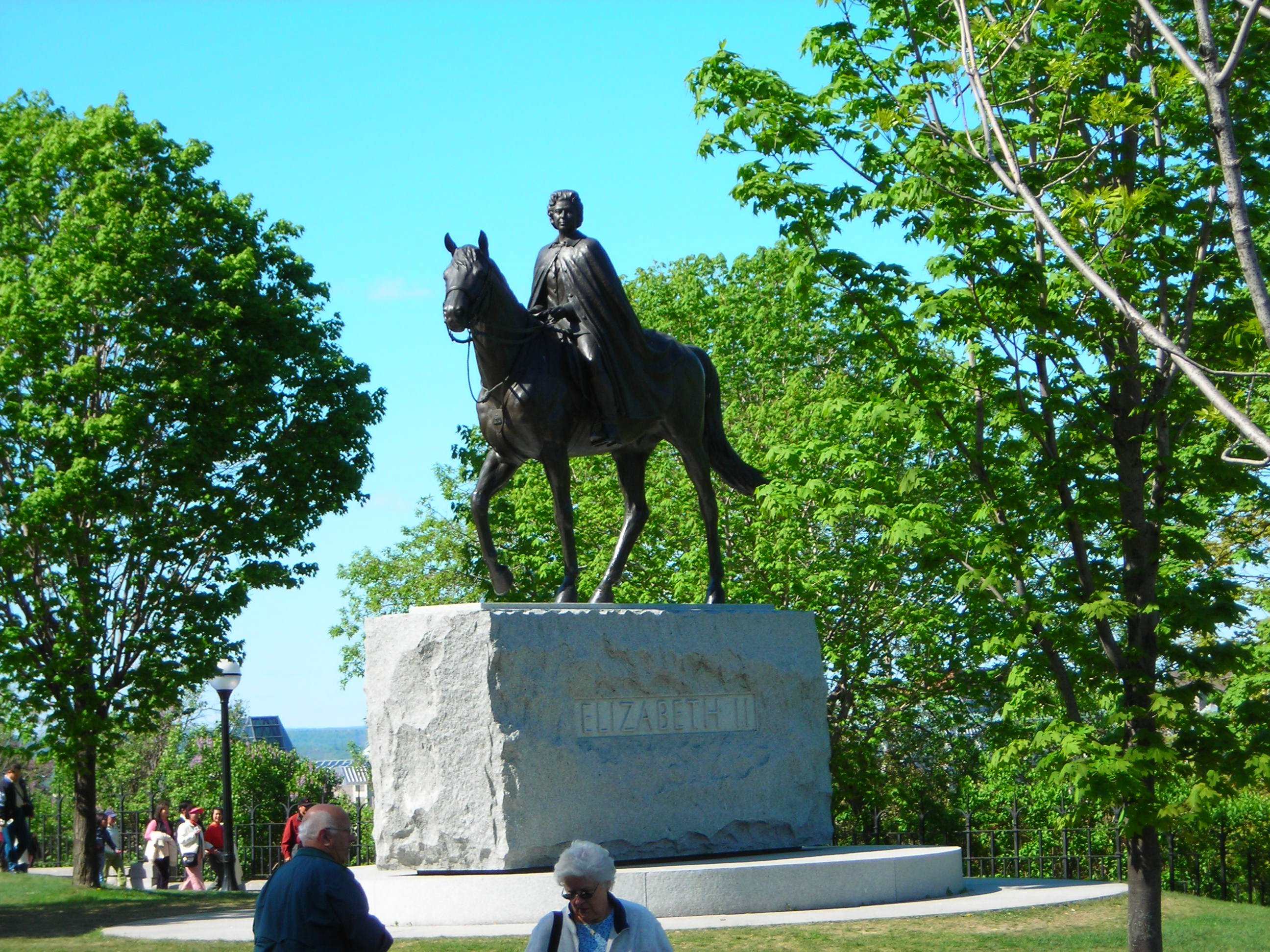 Statue de Sa majestée Élisabeth II à cheval sur la colline parlementaire d'Ottawa